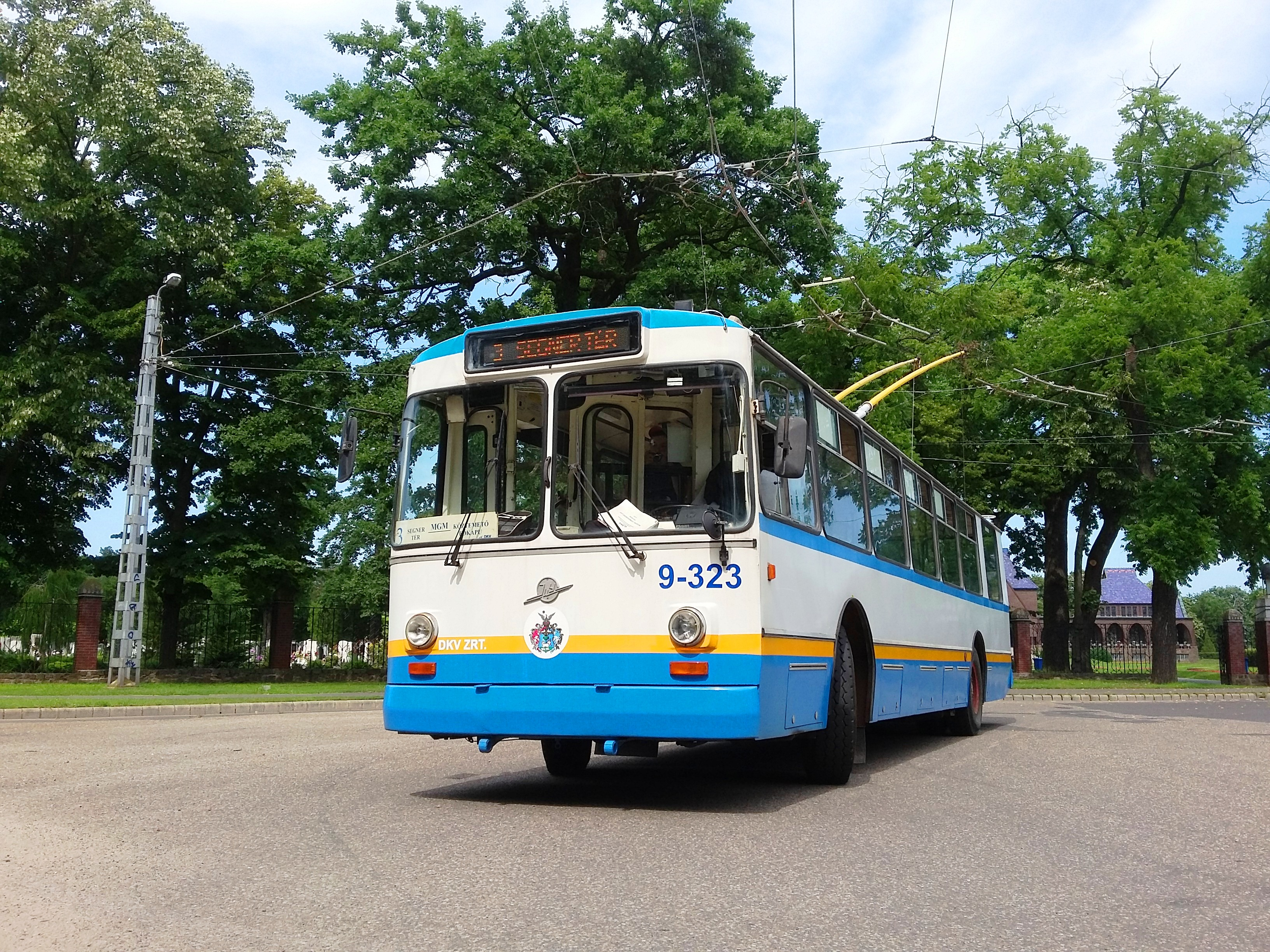 nosztalgiajárat